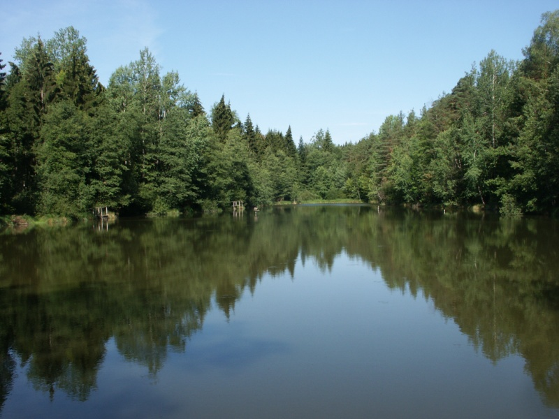 Treibsee bei Bühlerzell